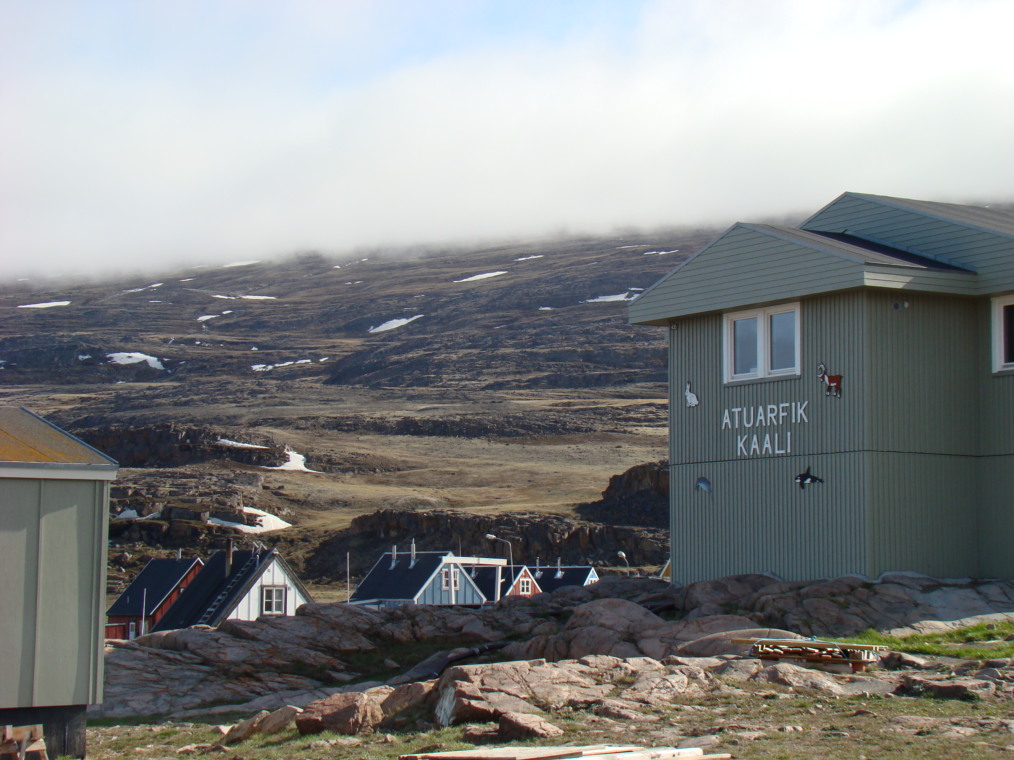 Kalaallisut: Atuarfik Kaali